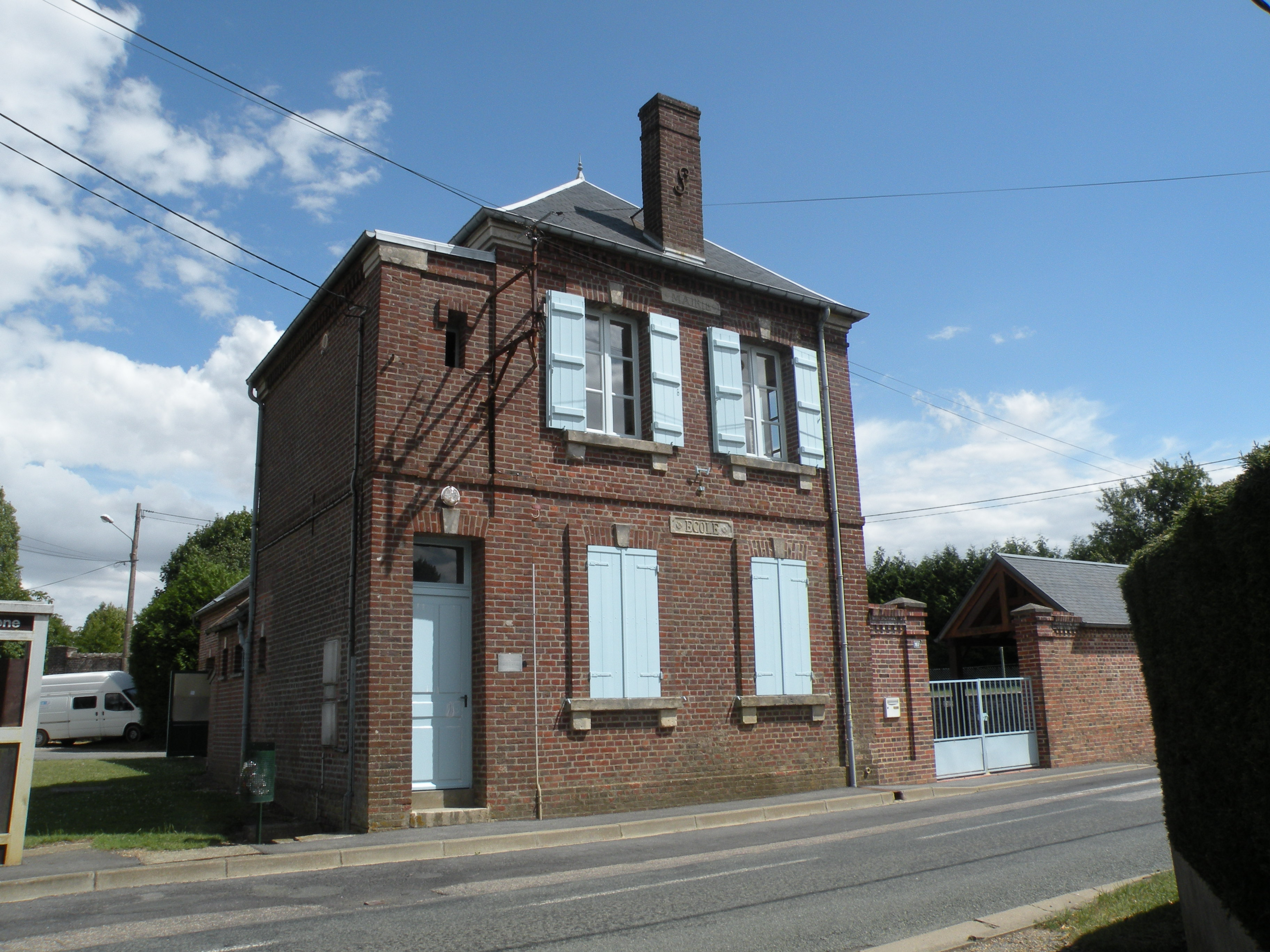 mairie école de Ressons-l'Abbaye